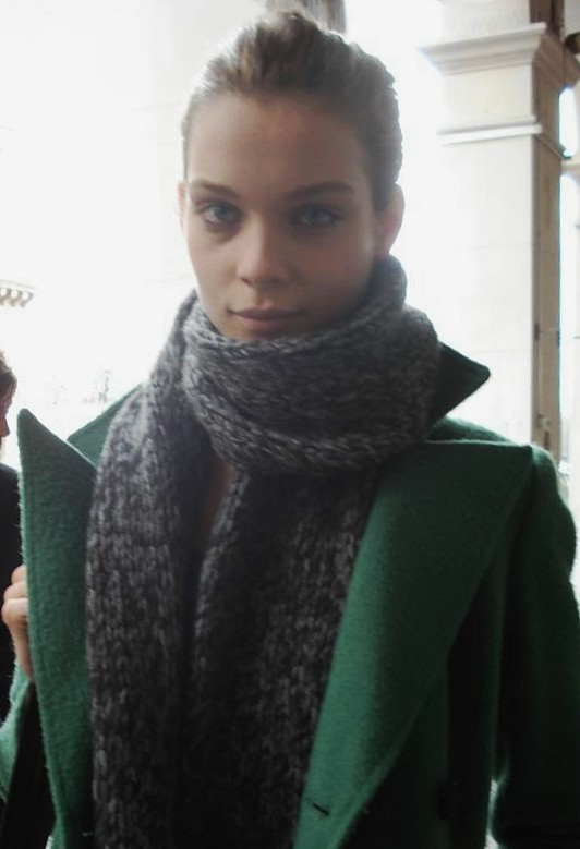 Model Kim Noorda